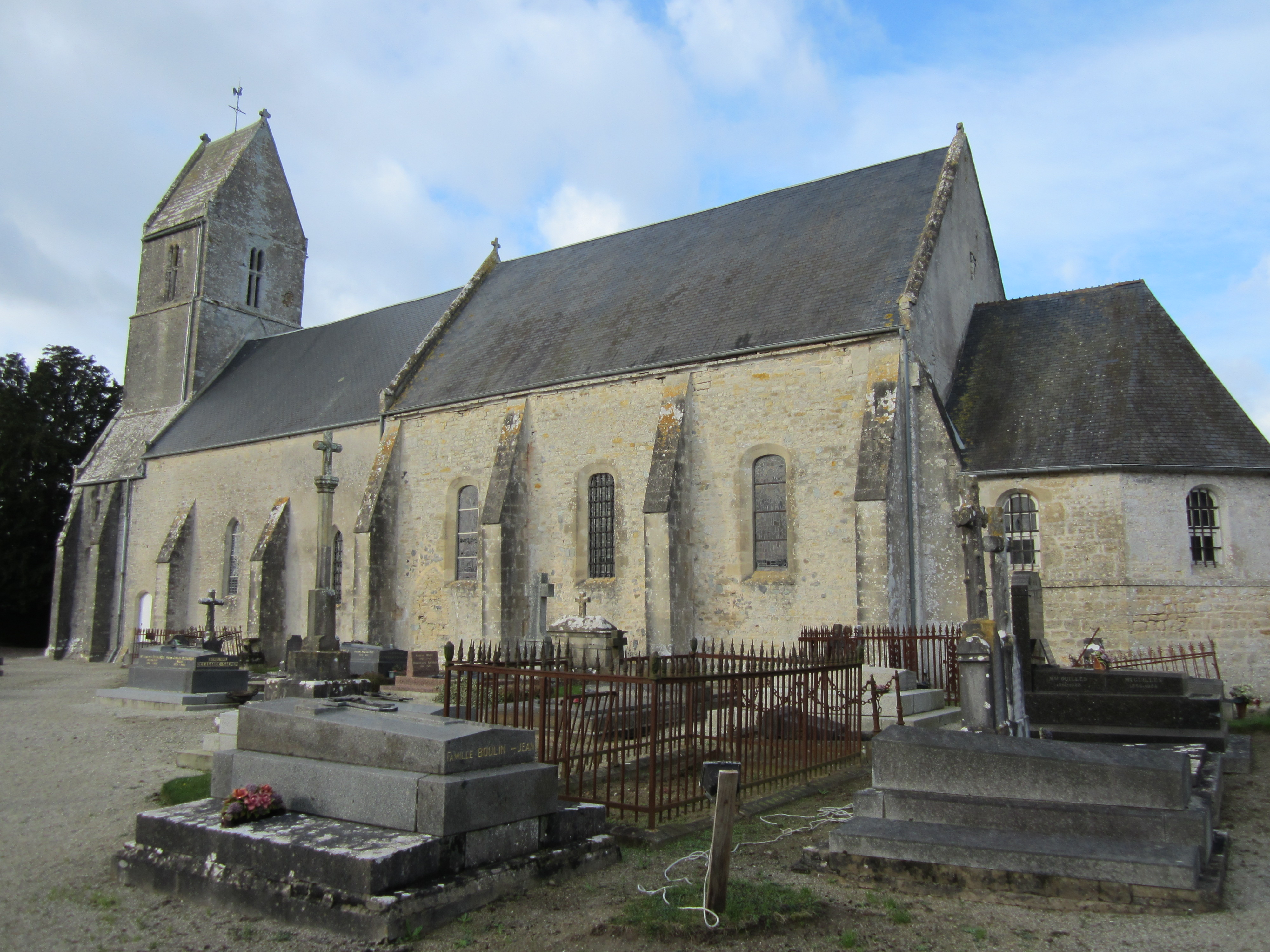 Église Saint-Christophe de Blosville